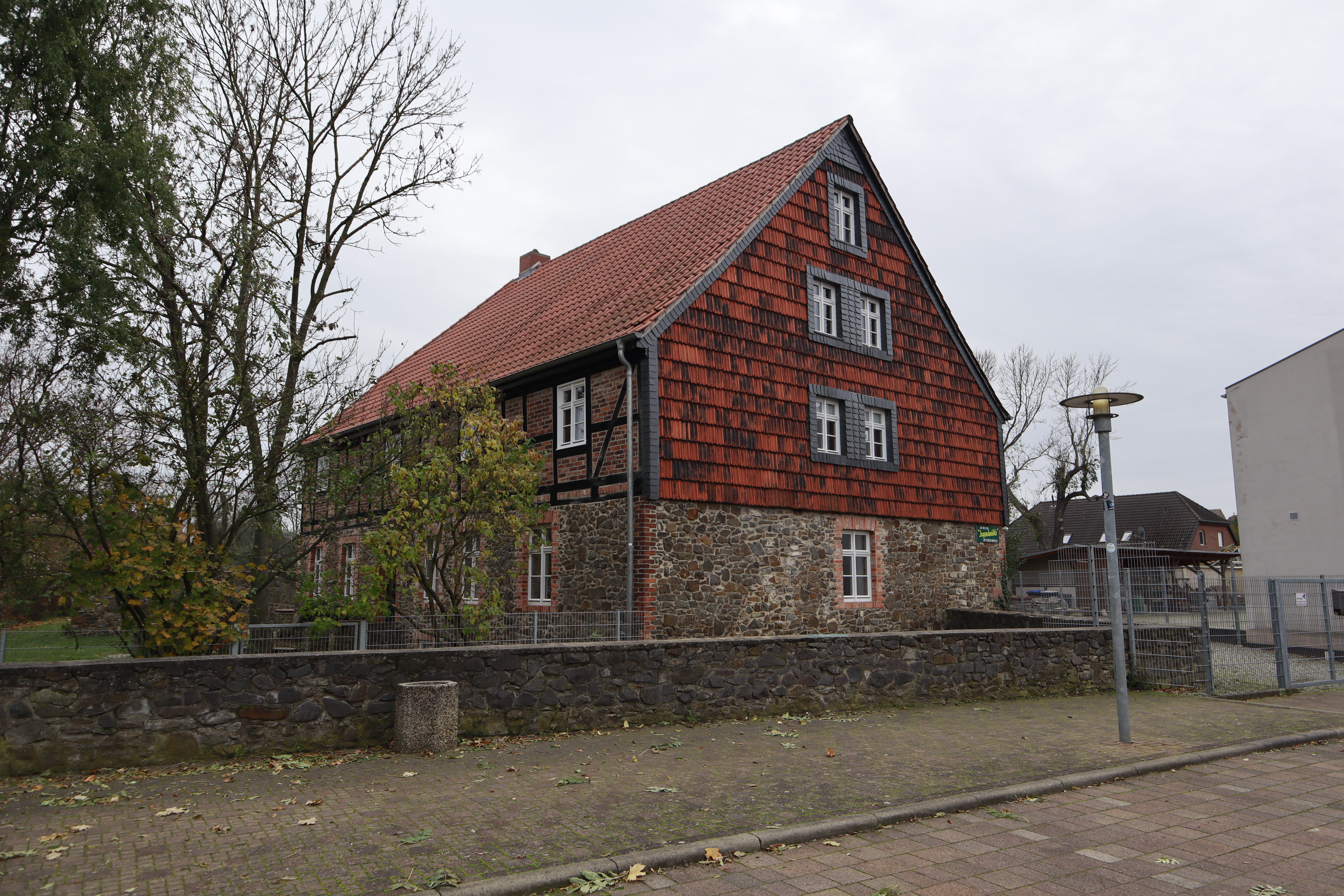 Althaldensleben, Jugendmuehle